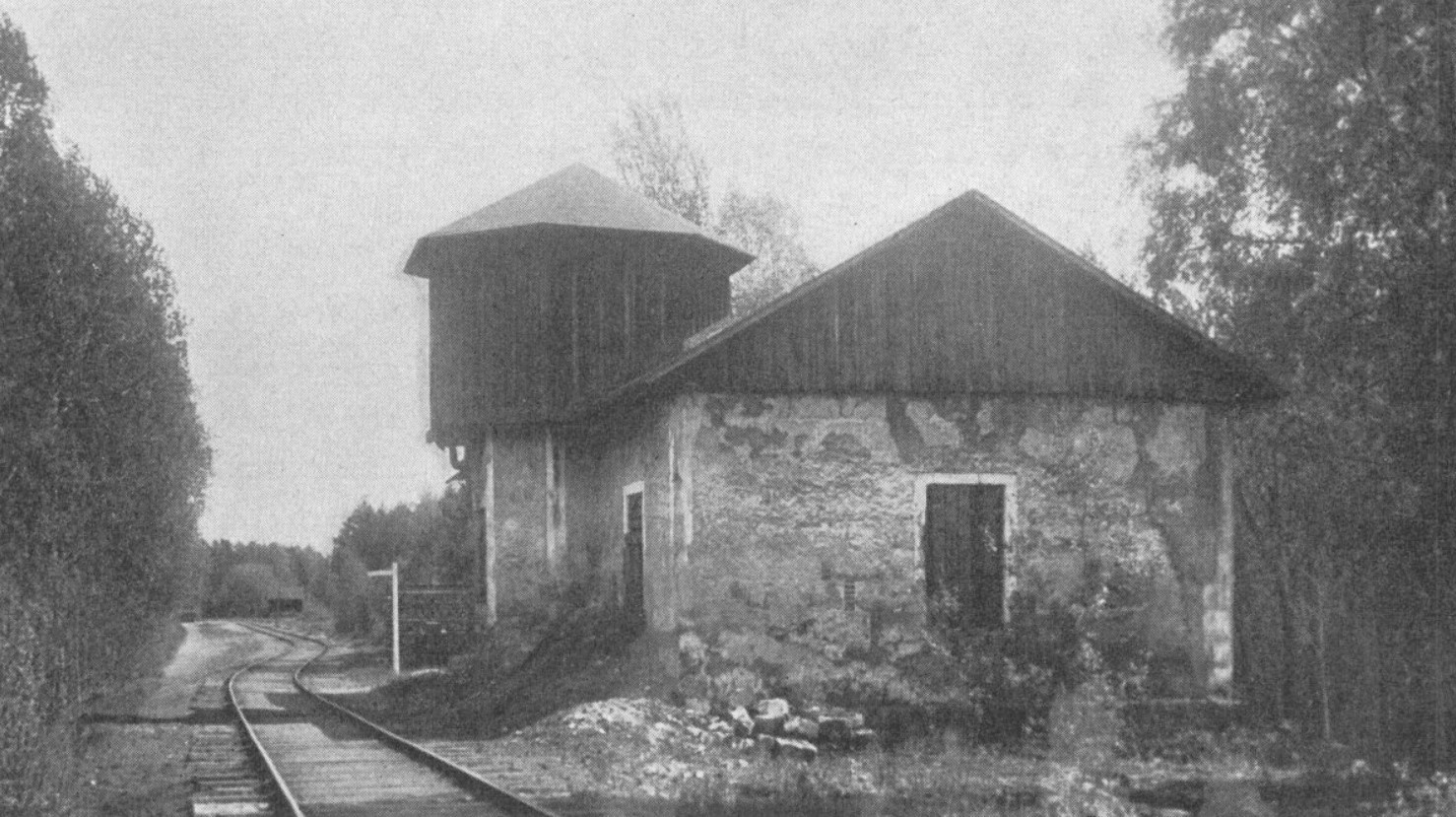 The engine shed belonging to Östra Värmlands Järnväg at Persbergs gruvor in Sweden